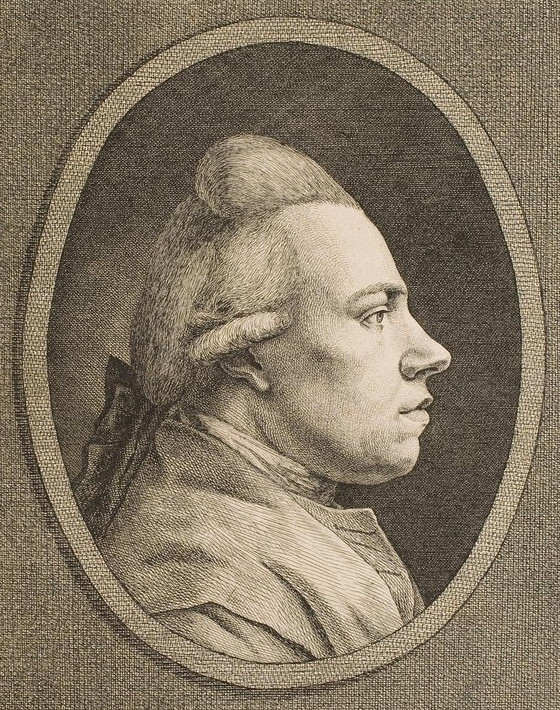 Illustration von: Johann Caspar Lavater (1741-1801), Physiognomische Fragmente zur Beförderung der Menschenkenntnis und Menschenliebe, Buch, 1775/1778, Leipzig, Bd. 1, zu S. 258